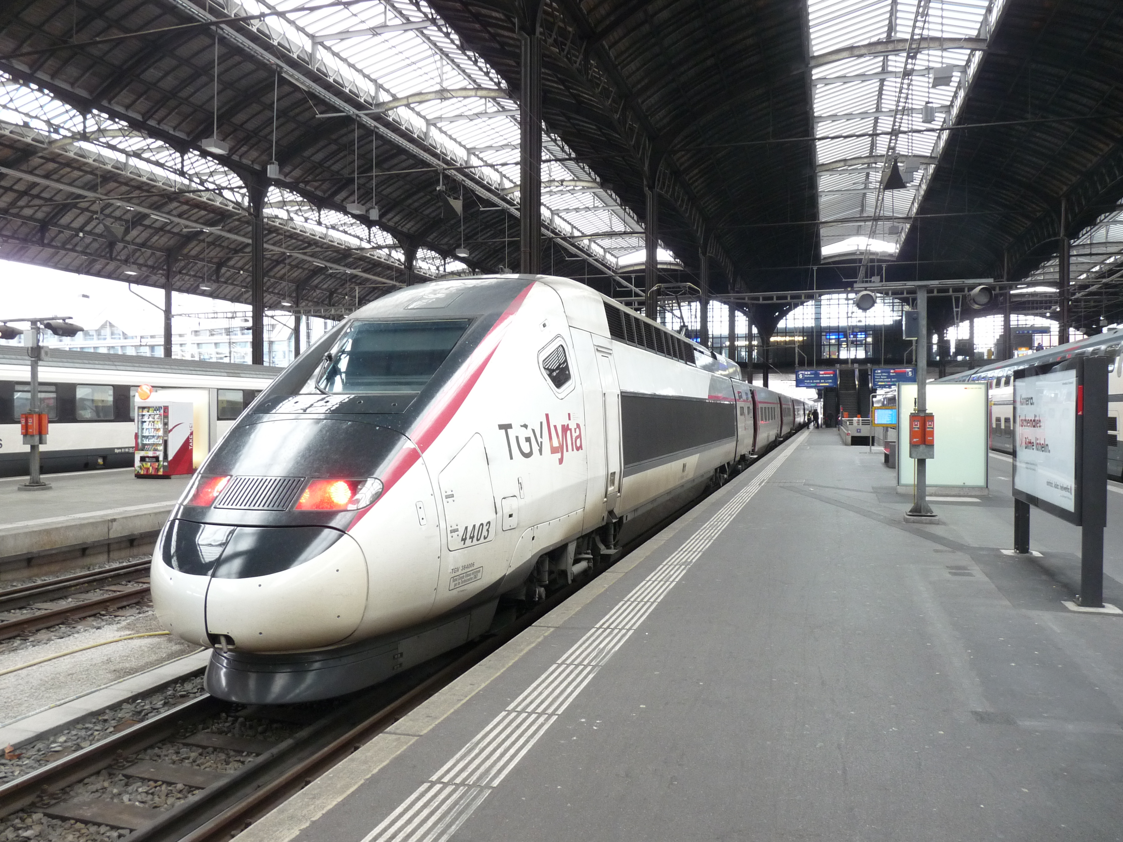 Treinen in Bazel SBB